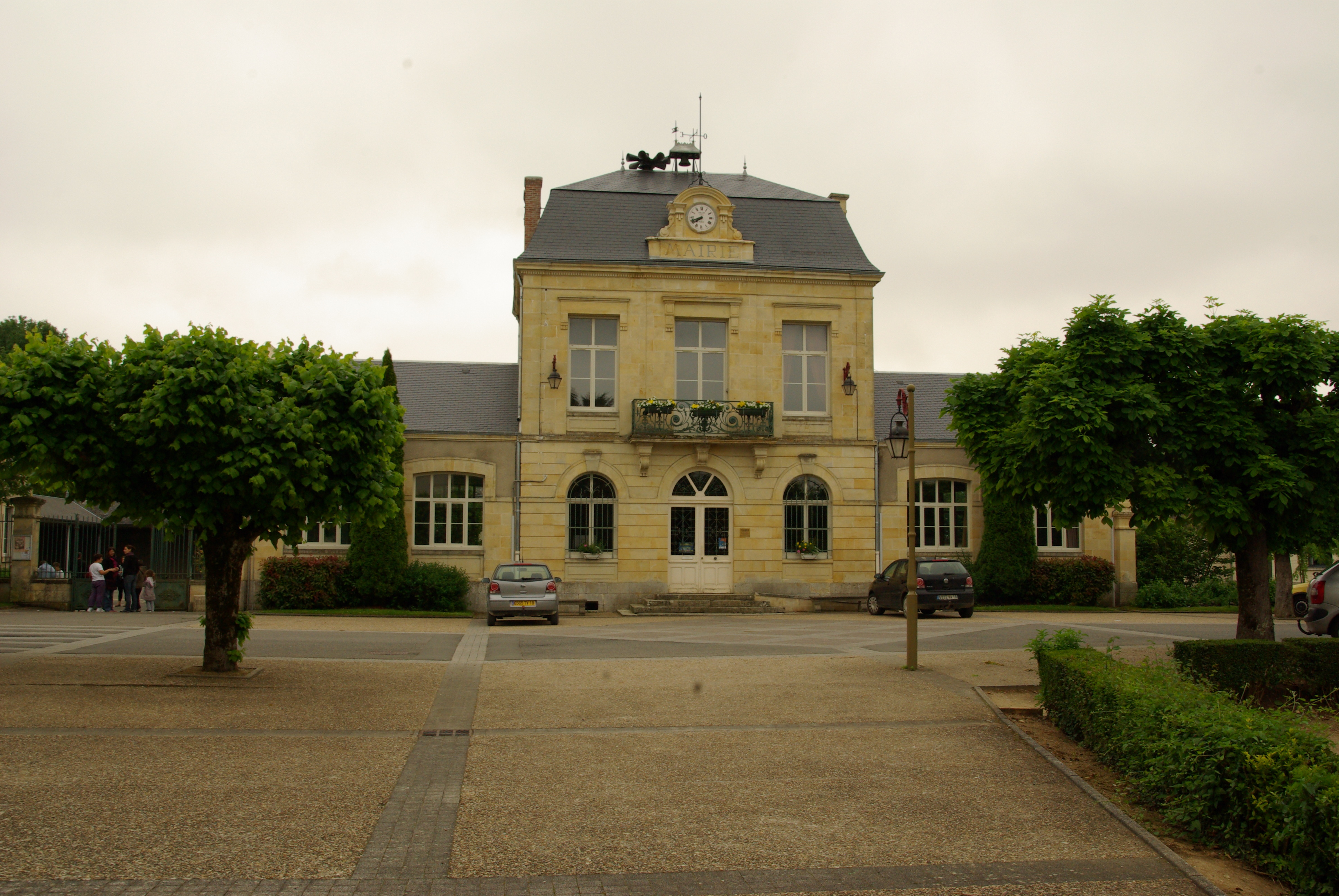 Mairie de Brécy